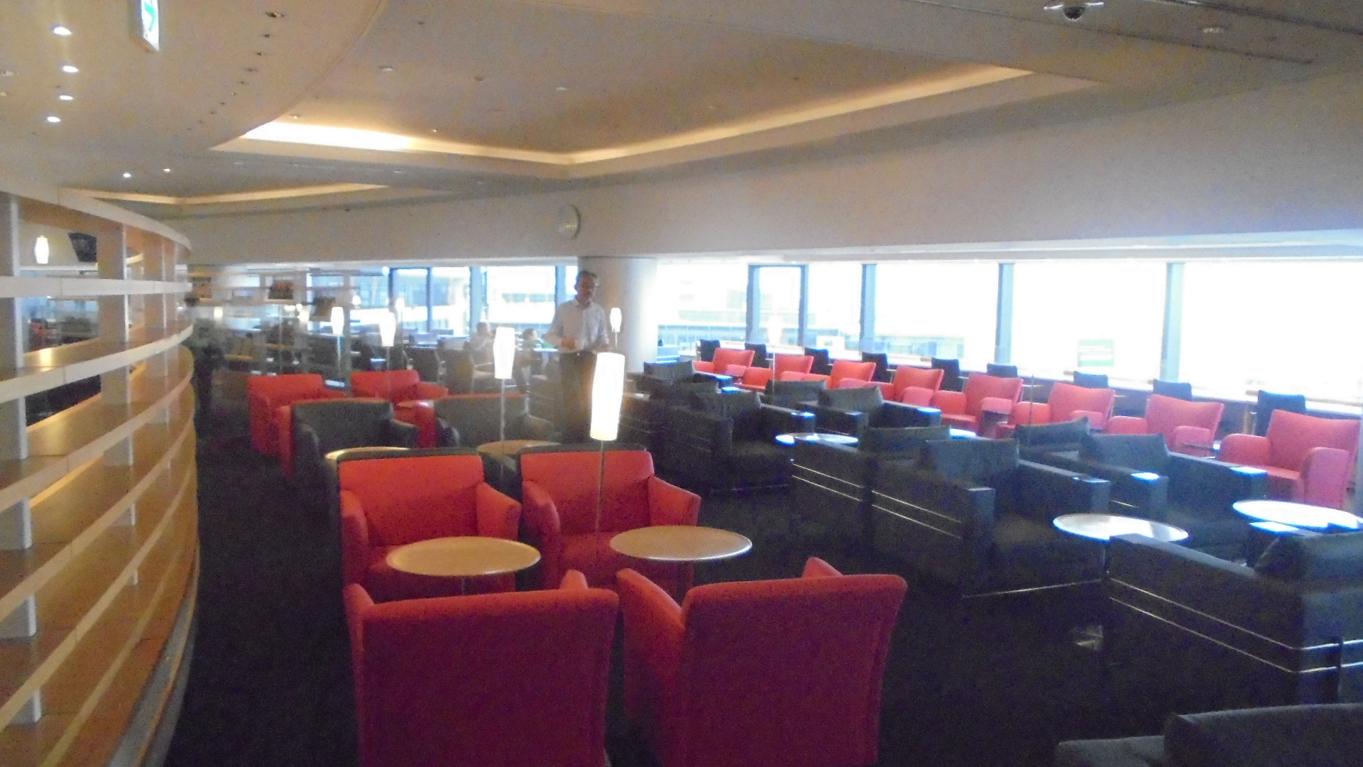 成田空港第１旅客ターミナルに設置されているデルタ航空のラウンジDelta Sky Club。2015年秋現在、59米ドルをクレジットカード決済すれば、第１旅客ターミナルから出発する全ての旅客（他の航空会社利用を含む）が利用可能である。尚、Delta Sky Clubのラウンジは同ターミナルに２つ設置されているが、利用権を得ると当日中に限り両方のラウンジを利用できる。